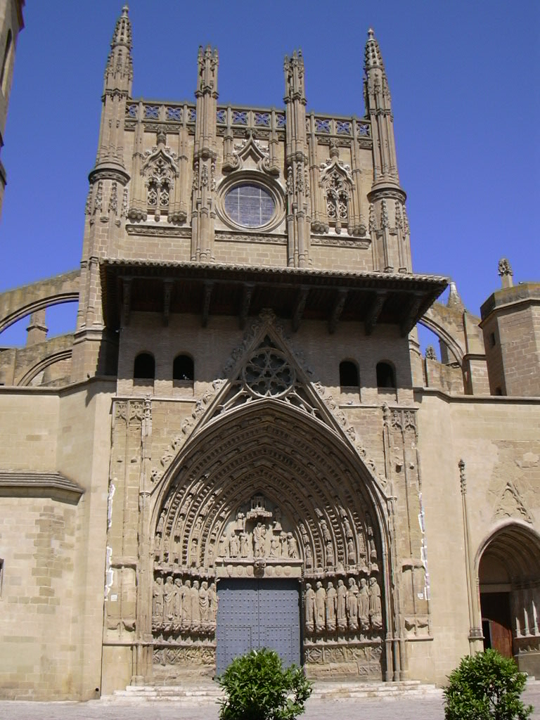 Huesca - Fachada de la catedral